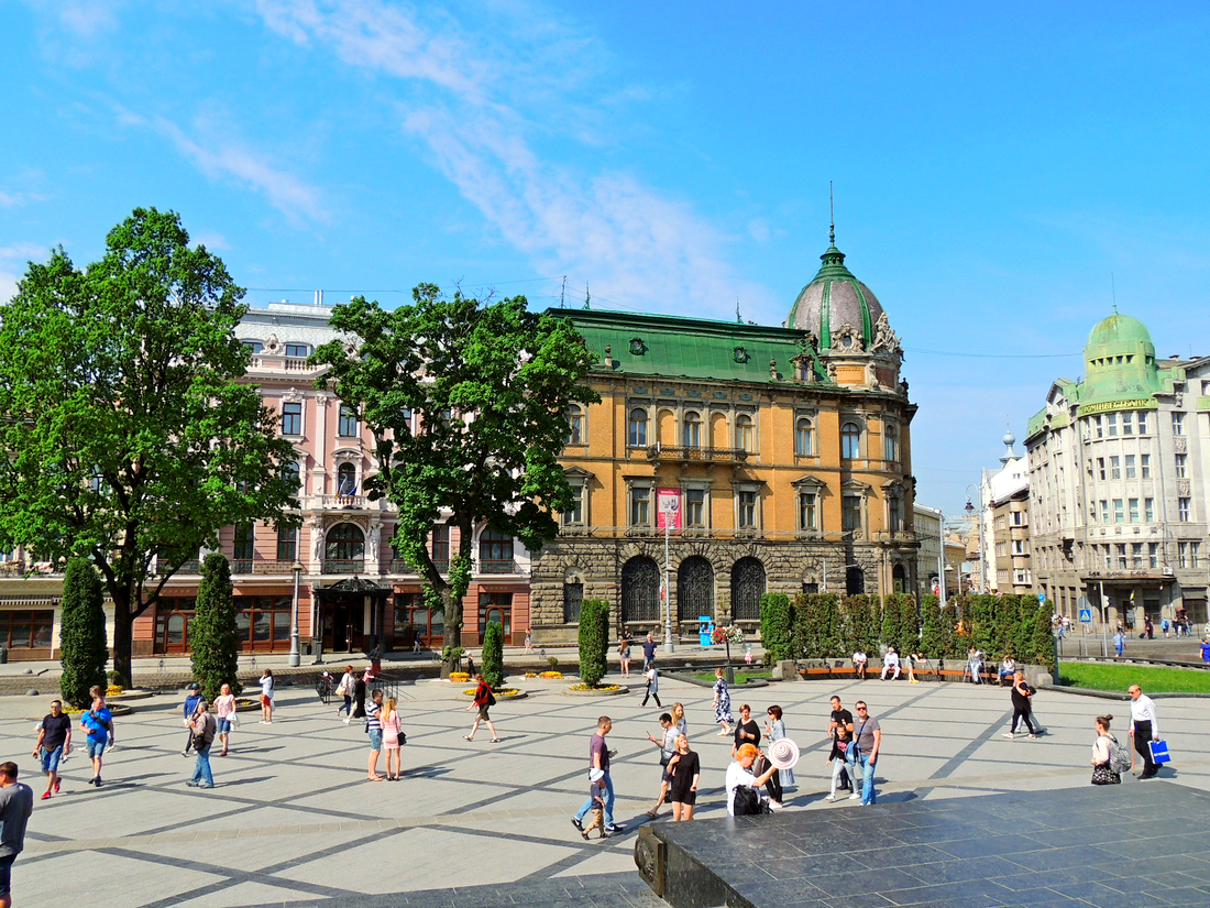 Проспект Свободи у Львові